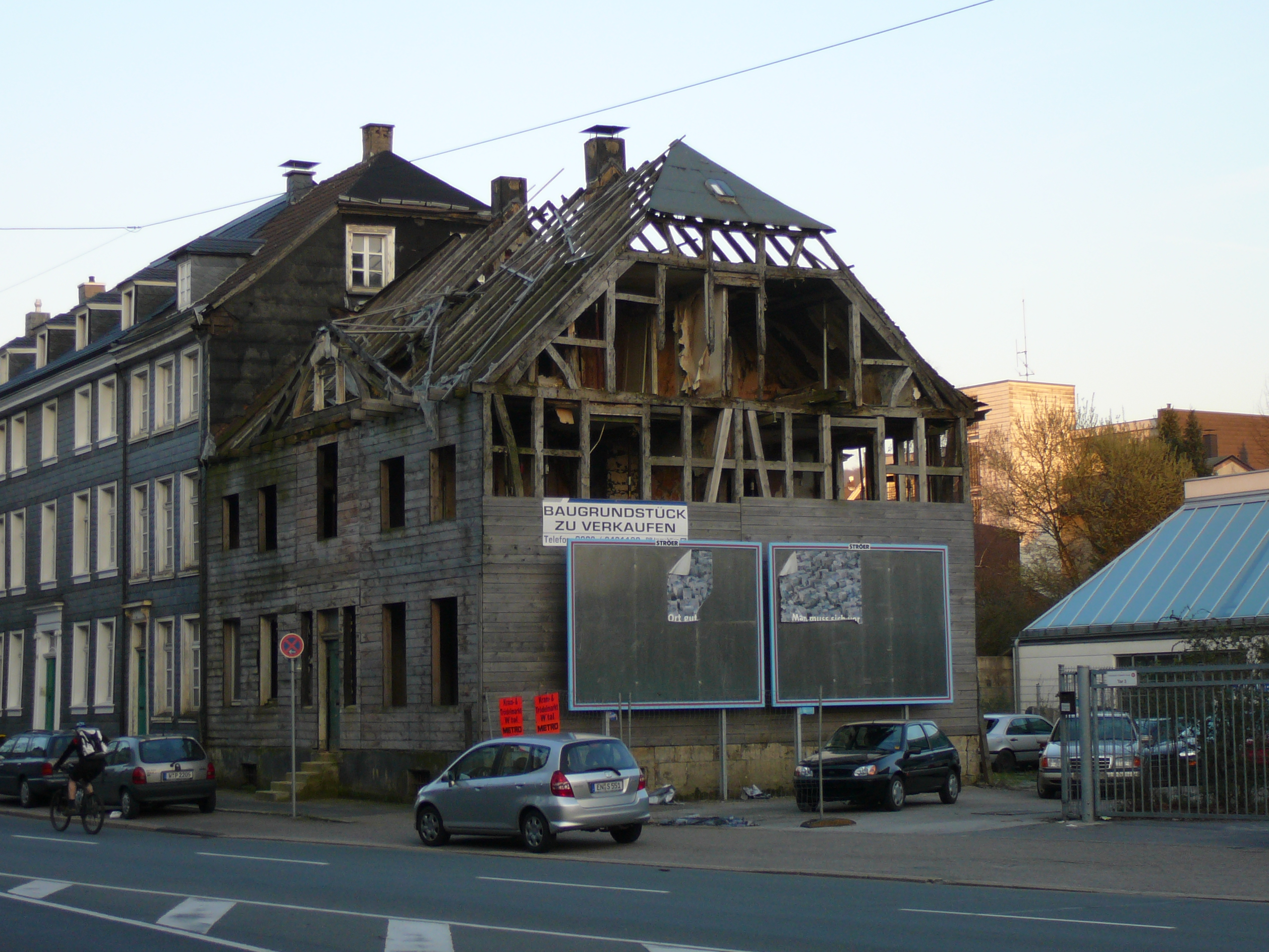 Friedrich-Engels-Allee, Wuppertal